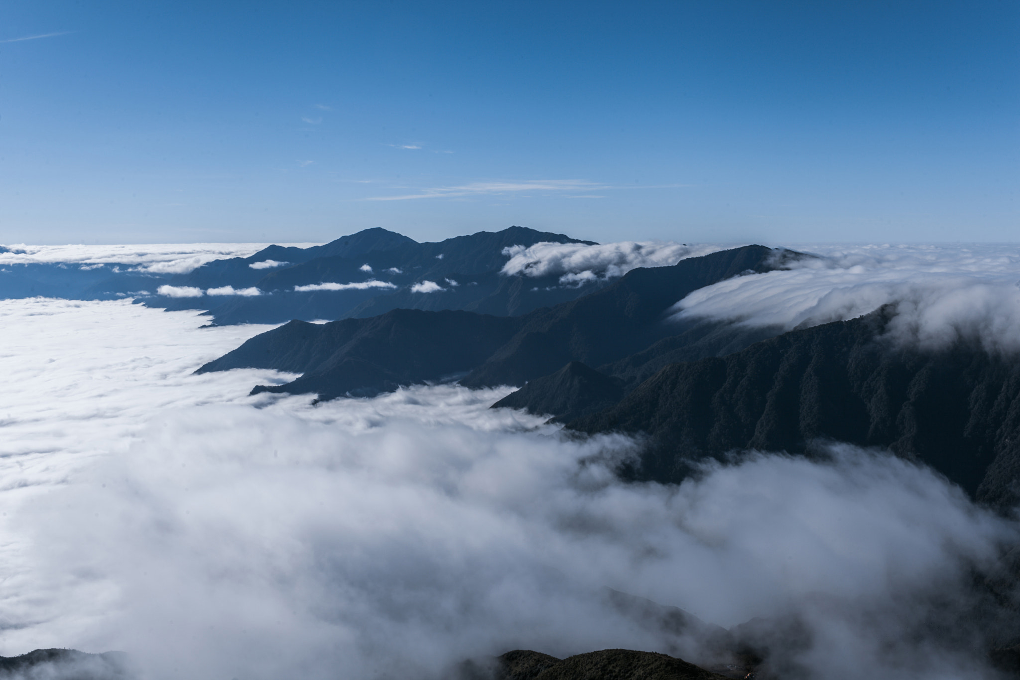 500px provided description: Phu Luong [#mountain ,#glacier ,#hill ,#ridge ,#avalanche ,#mountain peak ,#mountain range ,#alpenglow ,#snowcapped ,#mer de glace ,#extreme terrain ,#aiguille du dru]